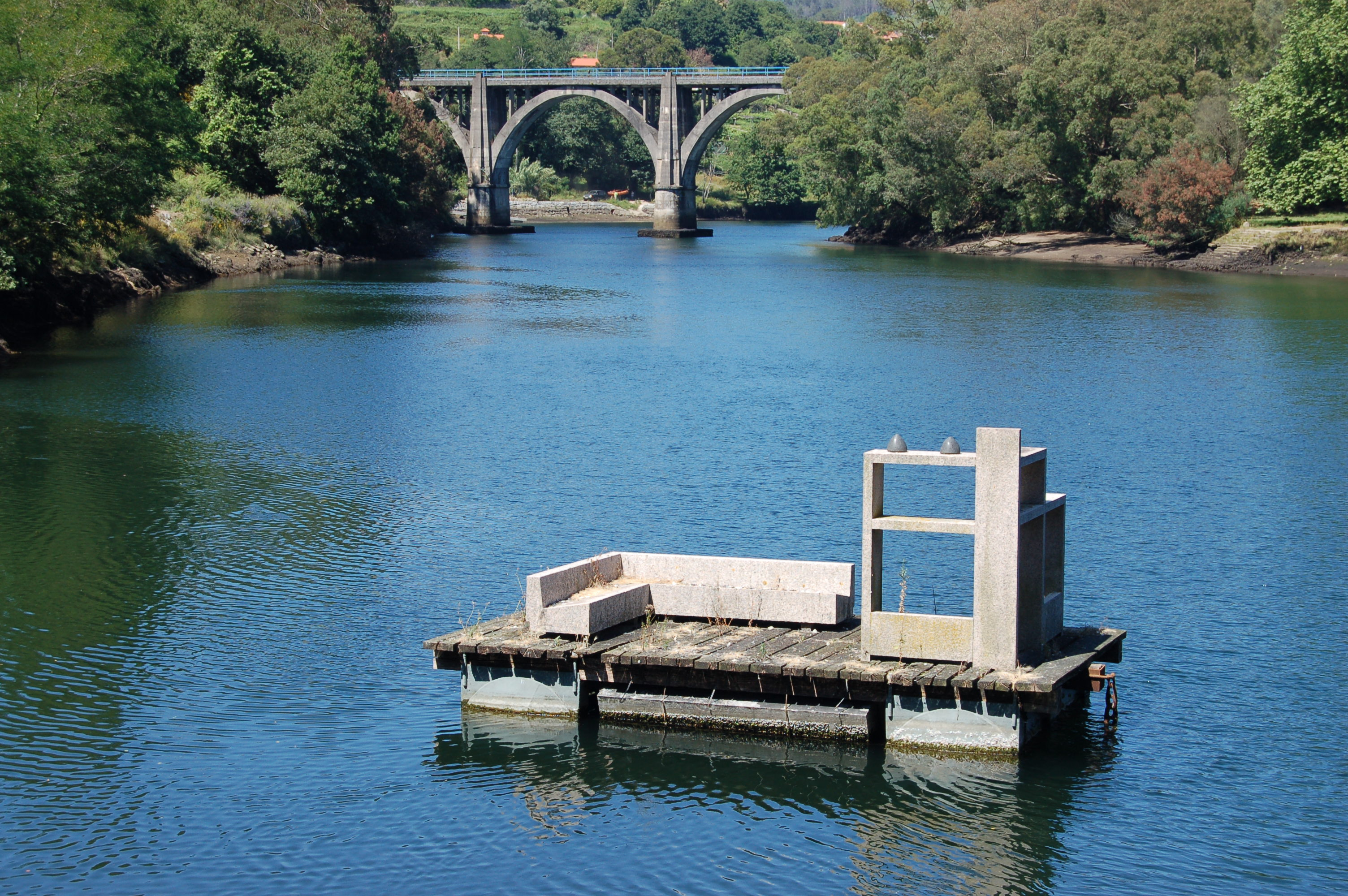 Saavedra, estatua de Francisco Leiro na Illa das Esculturas Categoría:Imaxes de Pontevedra